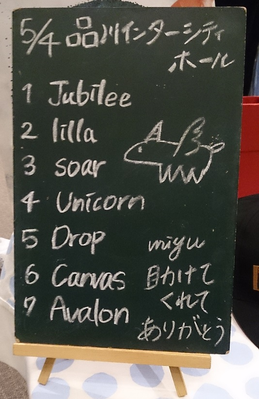 amiinAセトリボード(20180504(1))